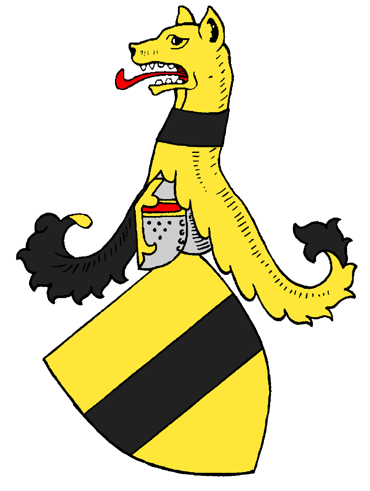 Stammwappen der Grafen von Moers